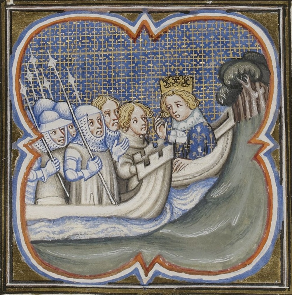 Départ de Saint Louis pour la huitième croisade. Enluminure des Grandes Chroniques de France, XIVe siècle. Paris, BnF, département des Manuscrits, Français 2813, folio 298 verso.